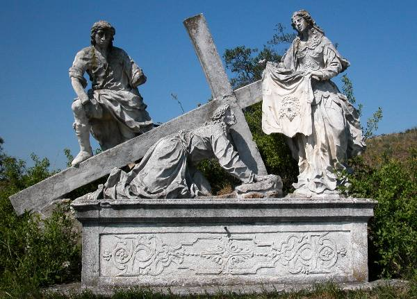 Der Kalvarienberg von Retz in Niederösterreich